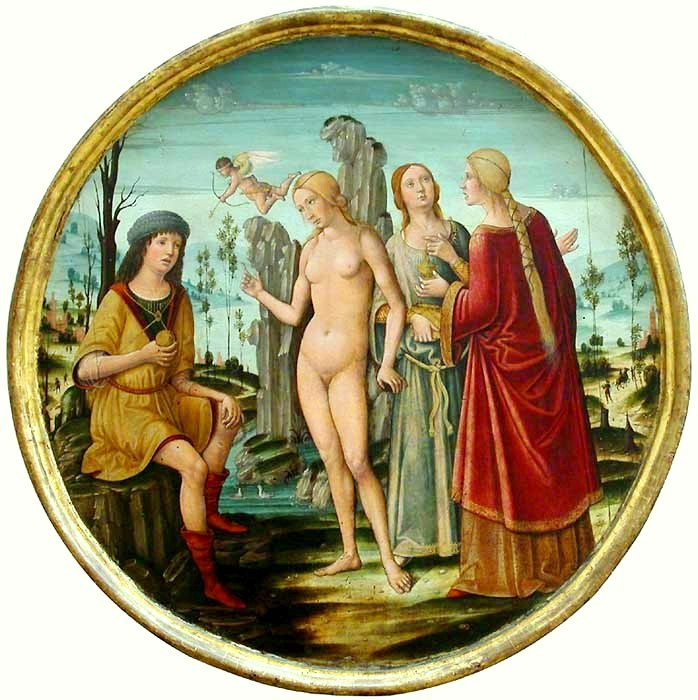 Le_Jugement_de_Paris.1500._Louvre..jpg